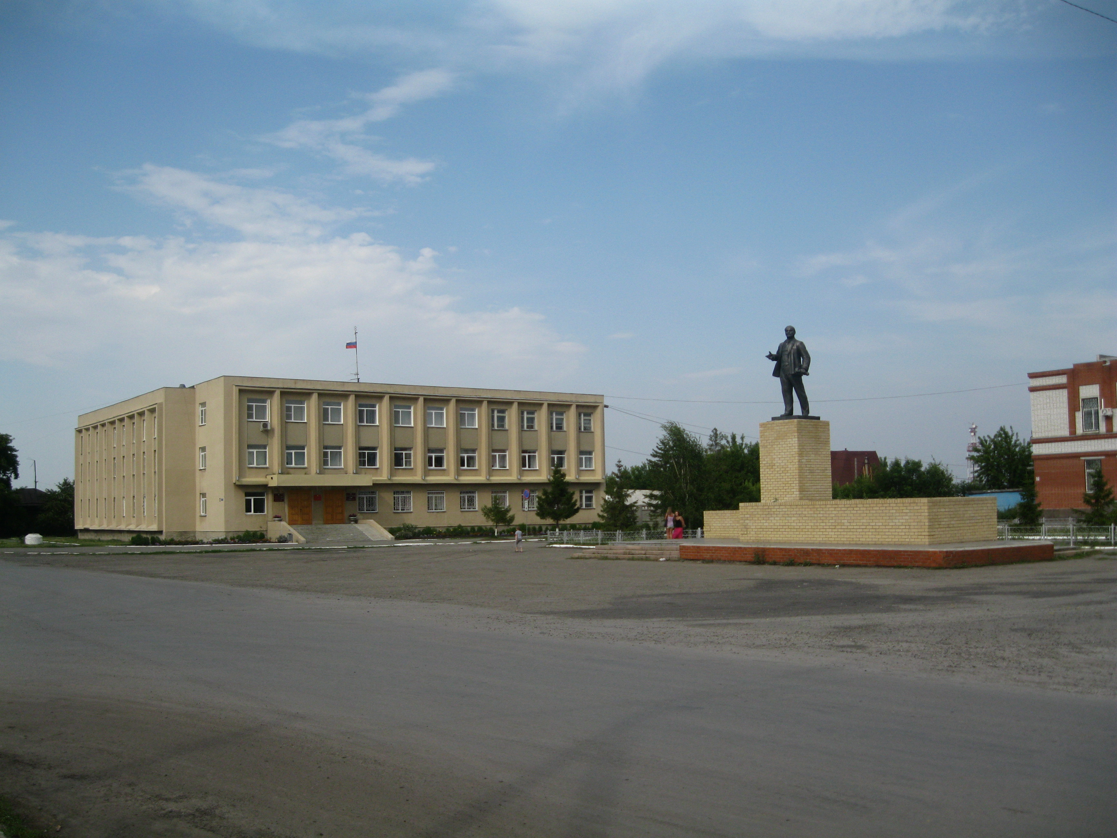 Центральная площадь и здание Администрации Варгашинского района, Варгаши, Курганская область, Россия